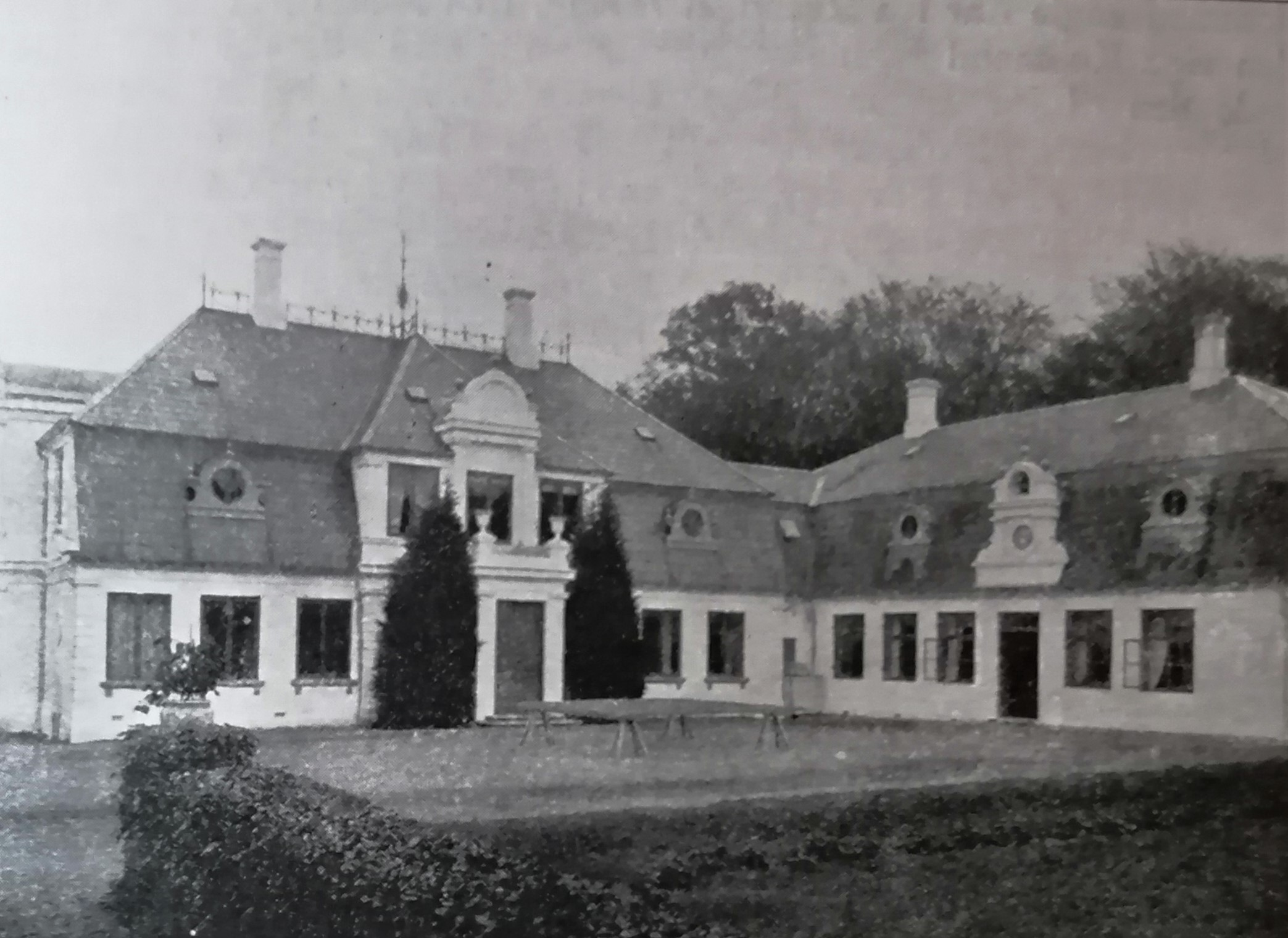 Aggershvile (Agershvile) var et landsted i Skodsborg i Nordsjælland.